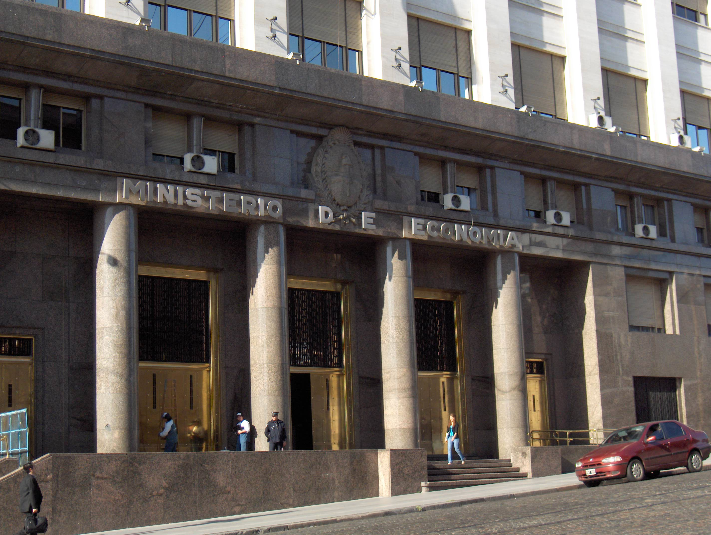 Edificio del Ministerio de Economía de la Nación Argentina, Ciudad Buenos Aires.